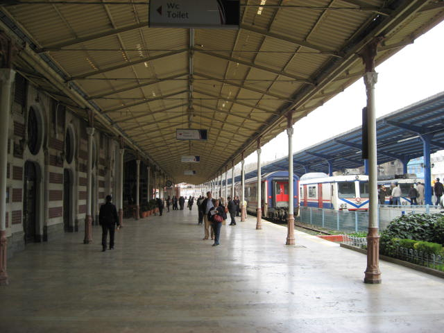 Sirkeci Terminal in Istanbul